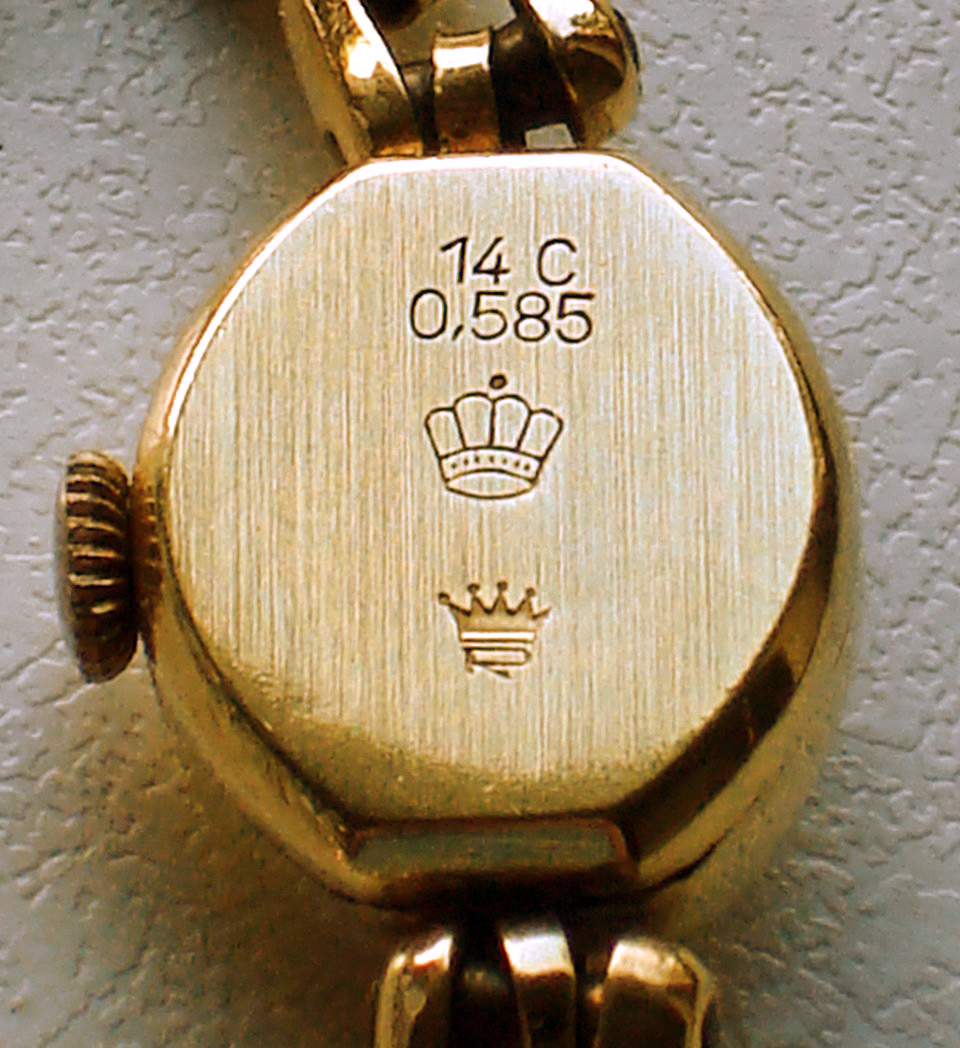 Karat-Angabe in zwei verschiedenen Notationen